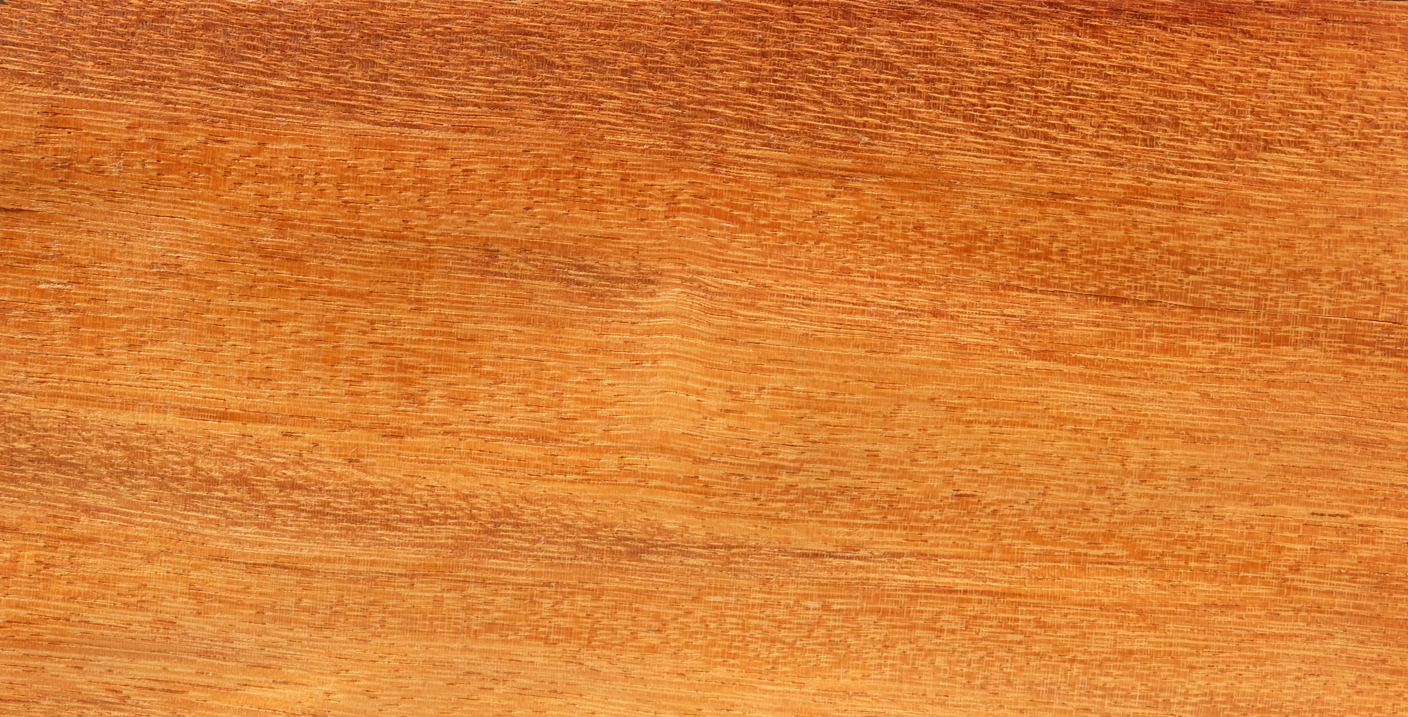 gemessertes Furnier; Holzart: AFZ, Afrikanisches AfzeliaDoussie, Apa Chamfuta, Lingue